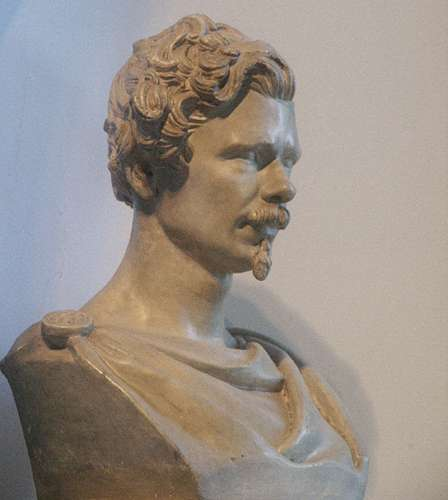 Johan Nicolaas van Gelder: portretbuste van B.C. Koekkoek, Museum Haus Koekkoek, Kleef